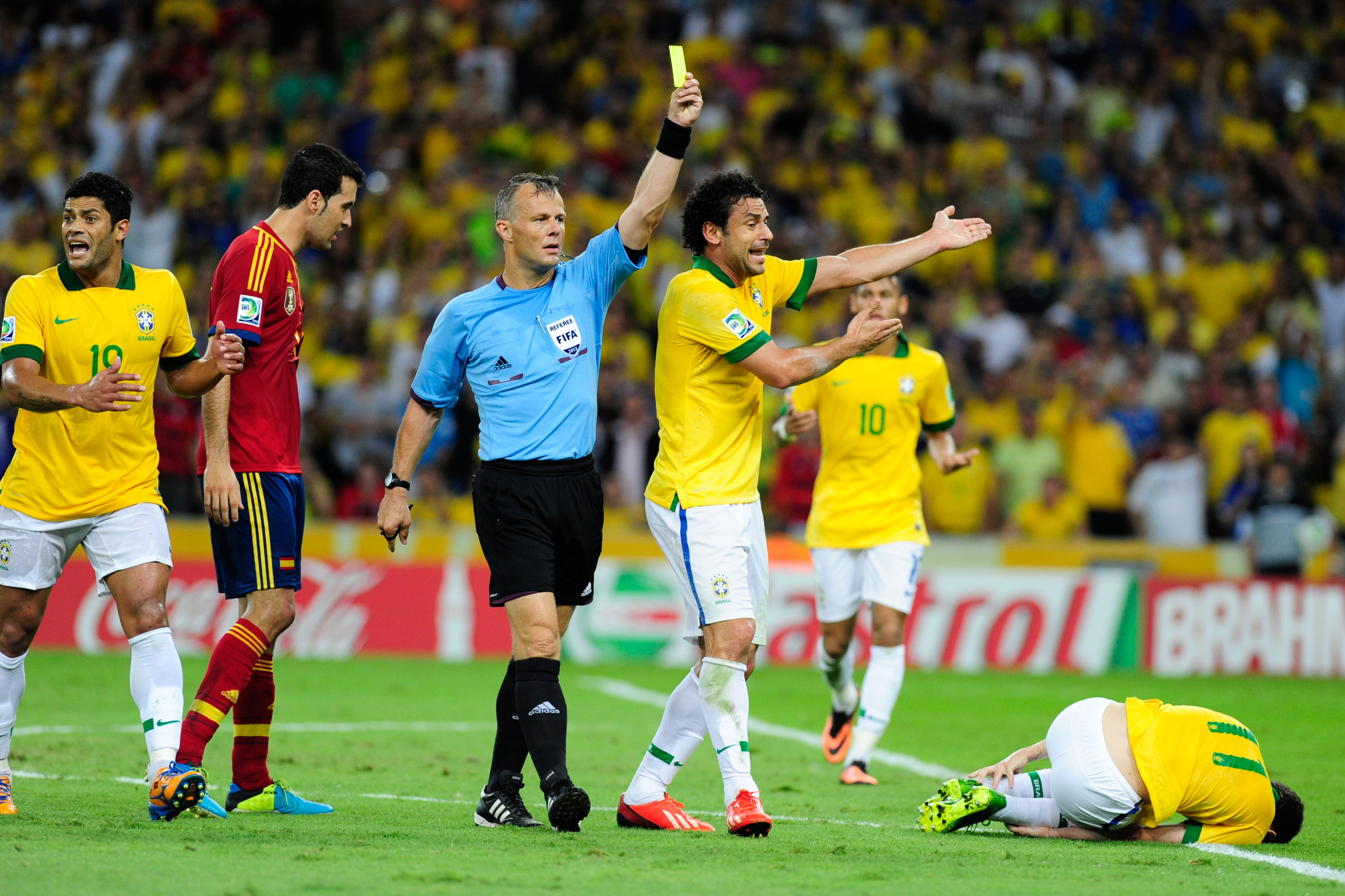 No Estádio do Maracanã, Brasil e Espanha disputam a taça da Copa das Confederações de 2013.